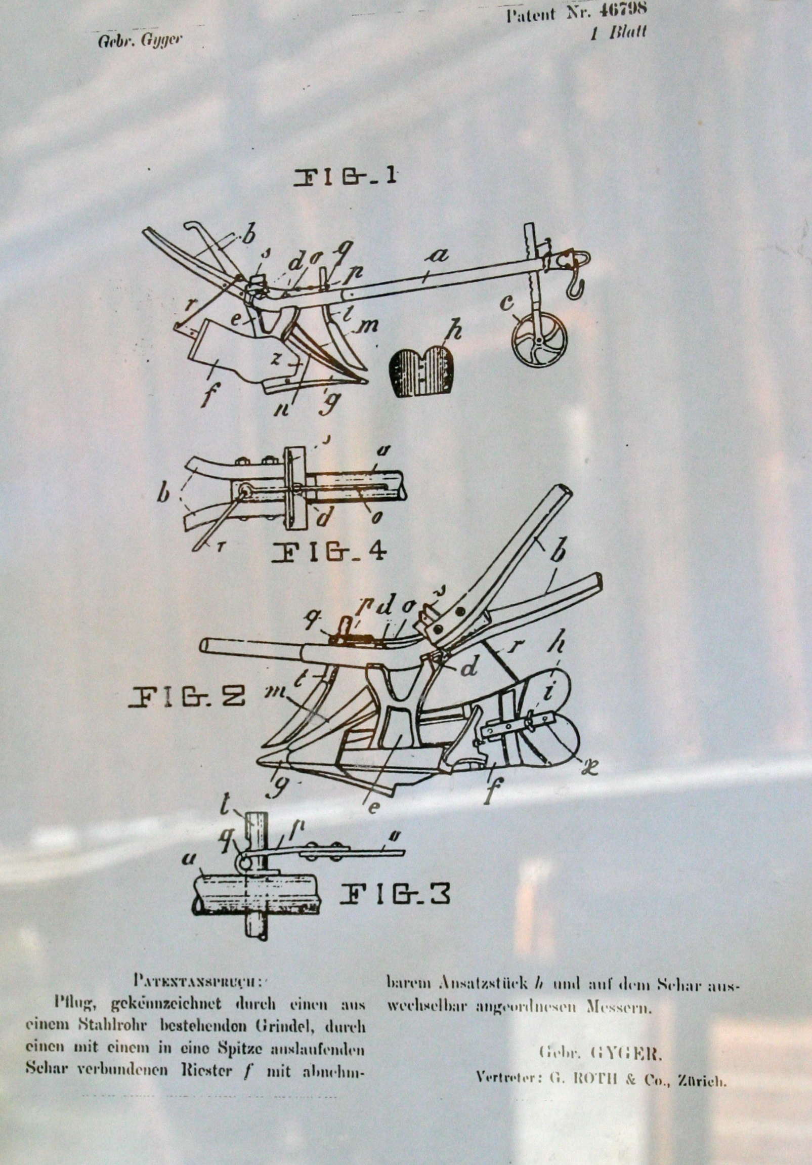 Historische Werkstätte Mulin Zeichnung zum Patent vom 26. Januar 1909